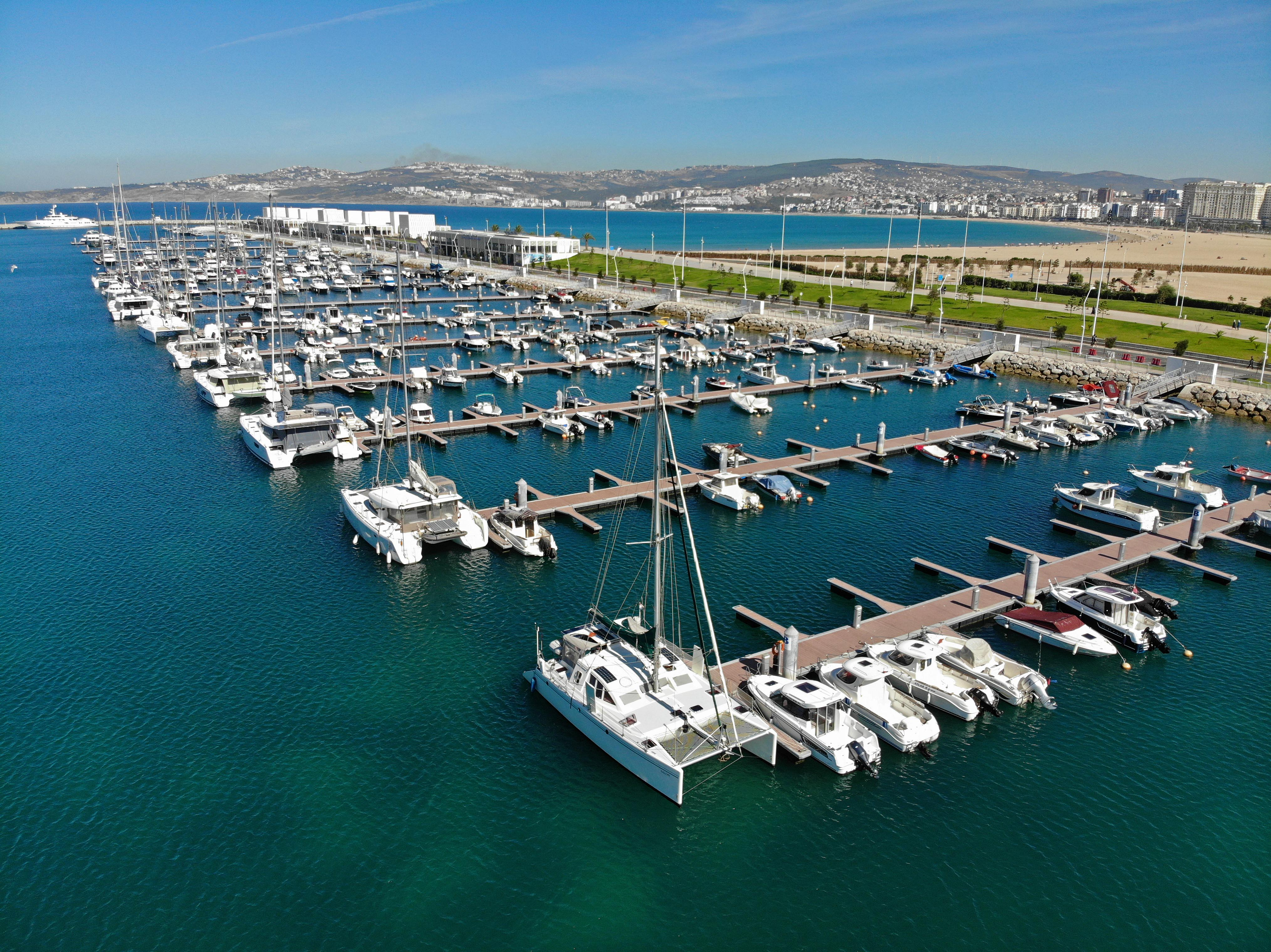 Vue par drone du 1er bassin de Tanja Marina Bay International et de la presqu'ile